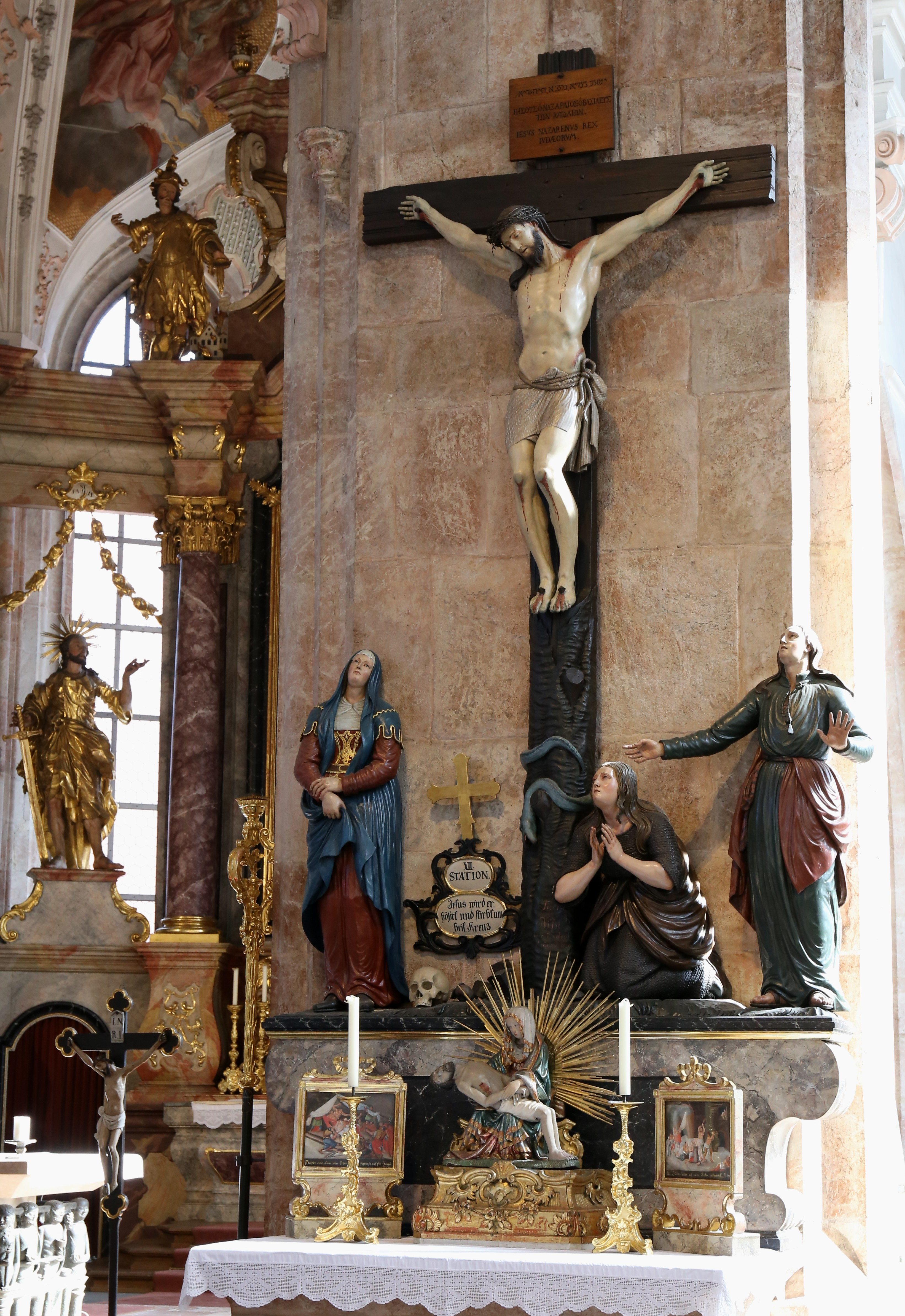 Bienerstraße, Rattenberg; Kath. Pfarrkirche hl. Virgil, Kreuzigungsgruppe